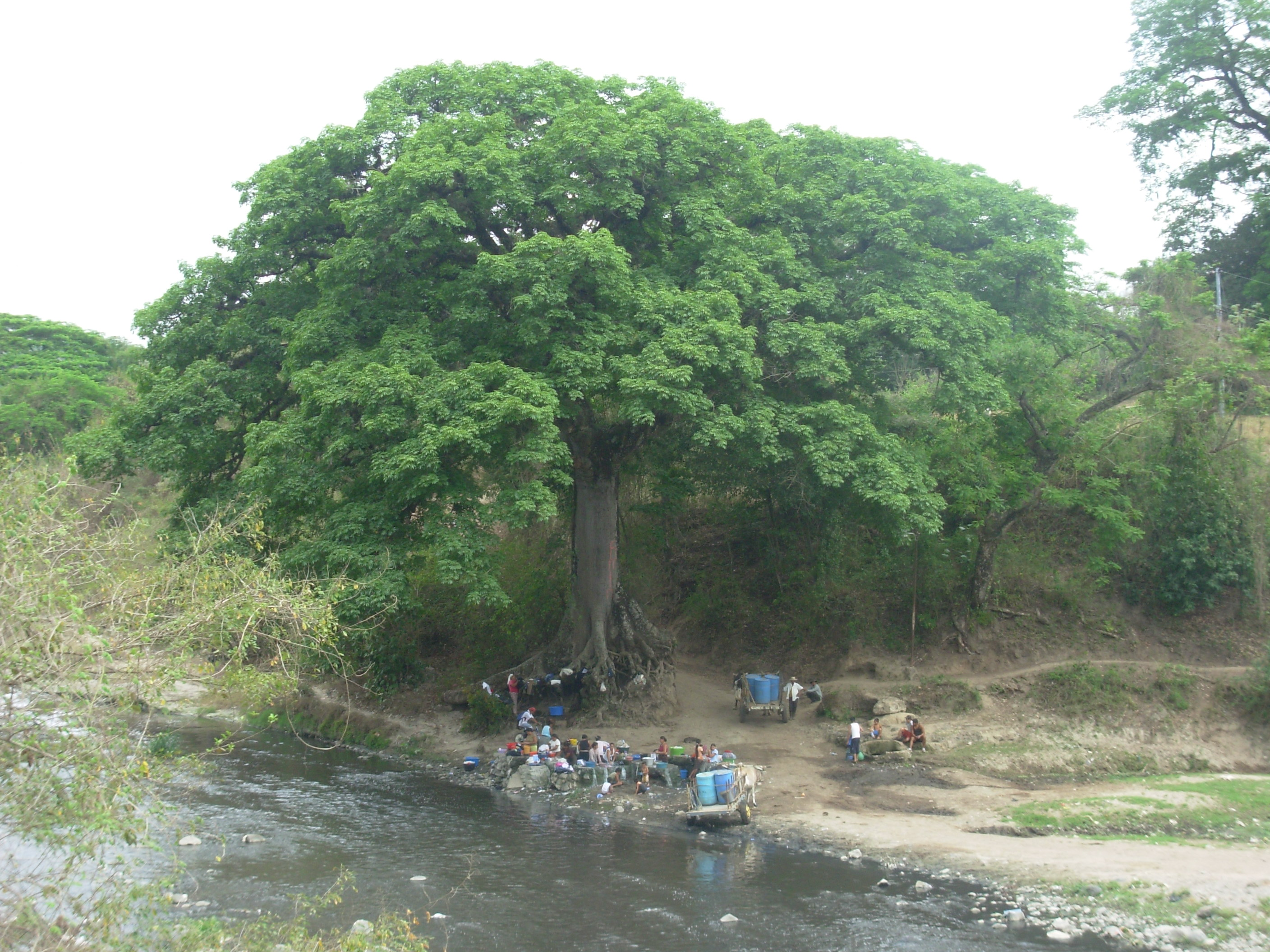 Rio Acelguate. Lavanderas y acarreadores de agua. Camino a Tutultepeque